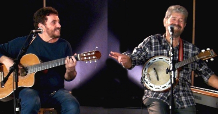 Antônio Carlos e Jocáfi formam uma dupla de cantores e compositores brasileiros, nascidos na Bahia, que começaram a carreira em 1969 no Festival Internacional da Canção e fizeram sucesso na década de 1970. Os nomes verdadeiros dos componentes da dupla são Antônio Carlos Marques Pinto e José Carlos Figueiredo.